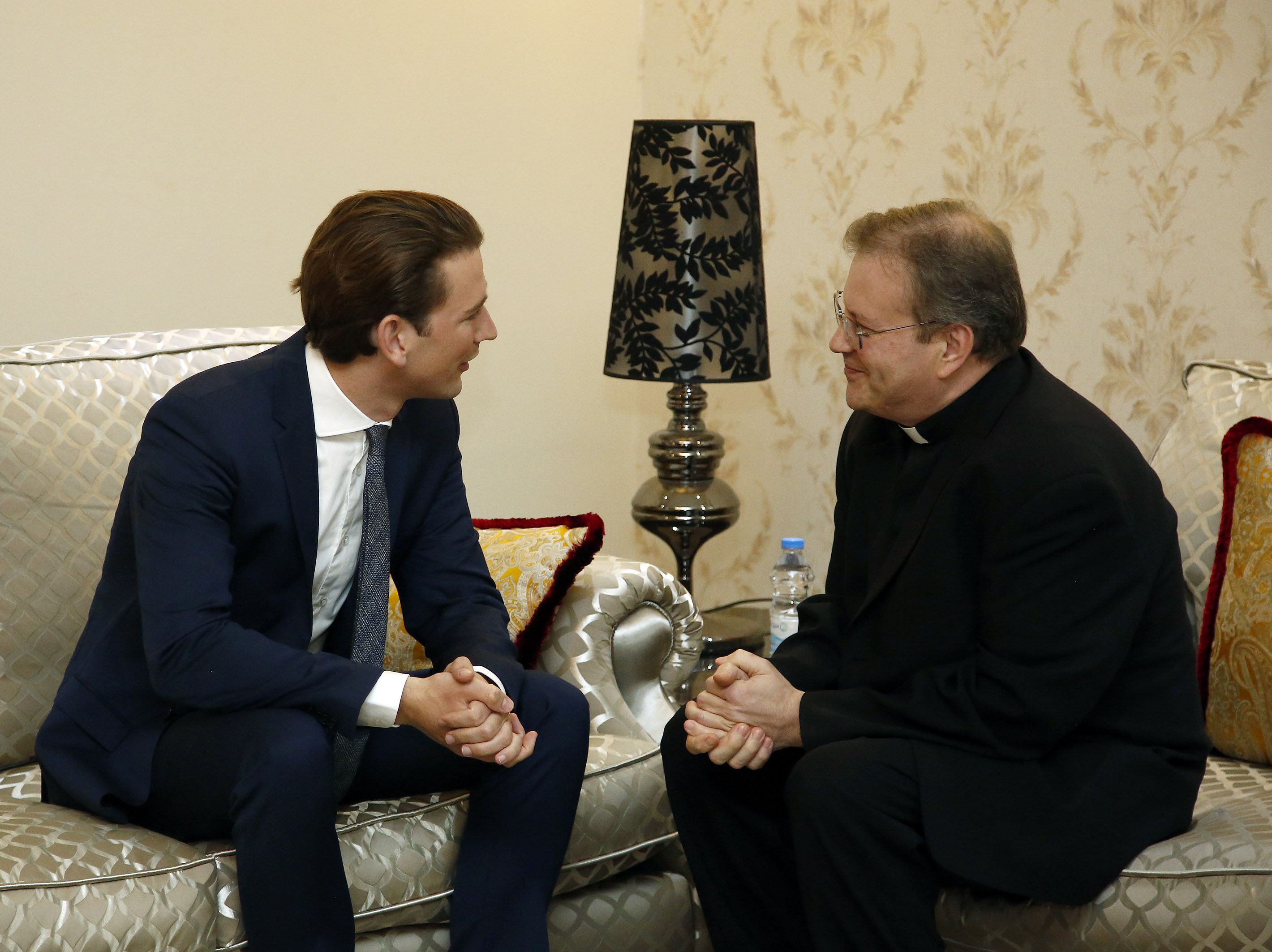 Arbeitsbesuch Libyen. Bundesminister Sebastian Kurz trifft den libyschen Bischof Bugeja. 01.05.2017, Foto: Dragan Tatic